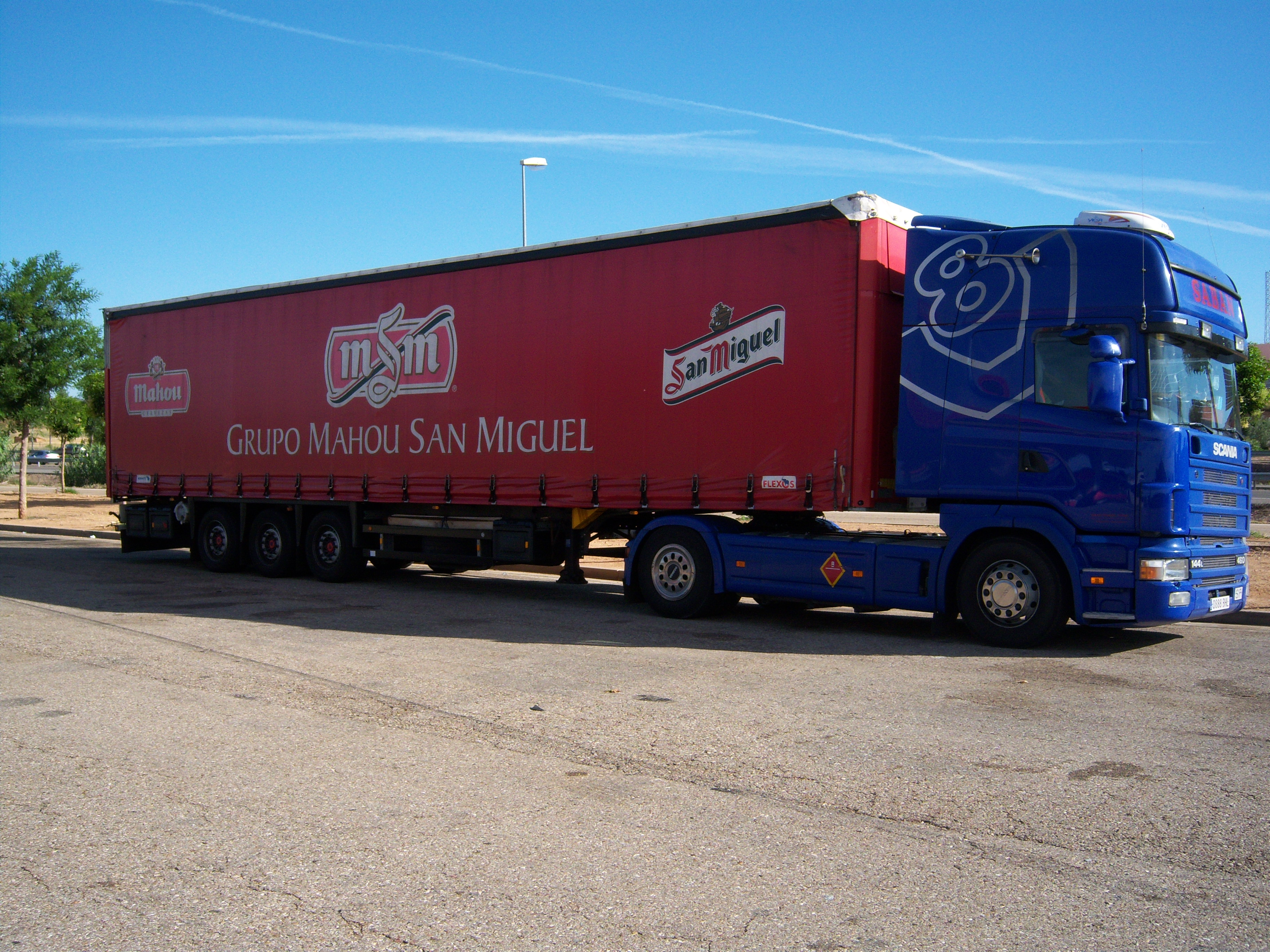 Camión Scania 144L 460 trailer de distribución de cervezas del grupo Mahou-San Miguel.